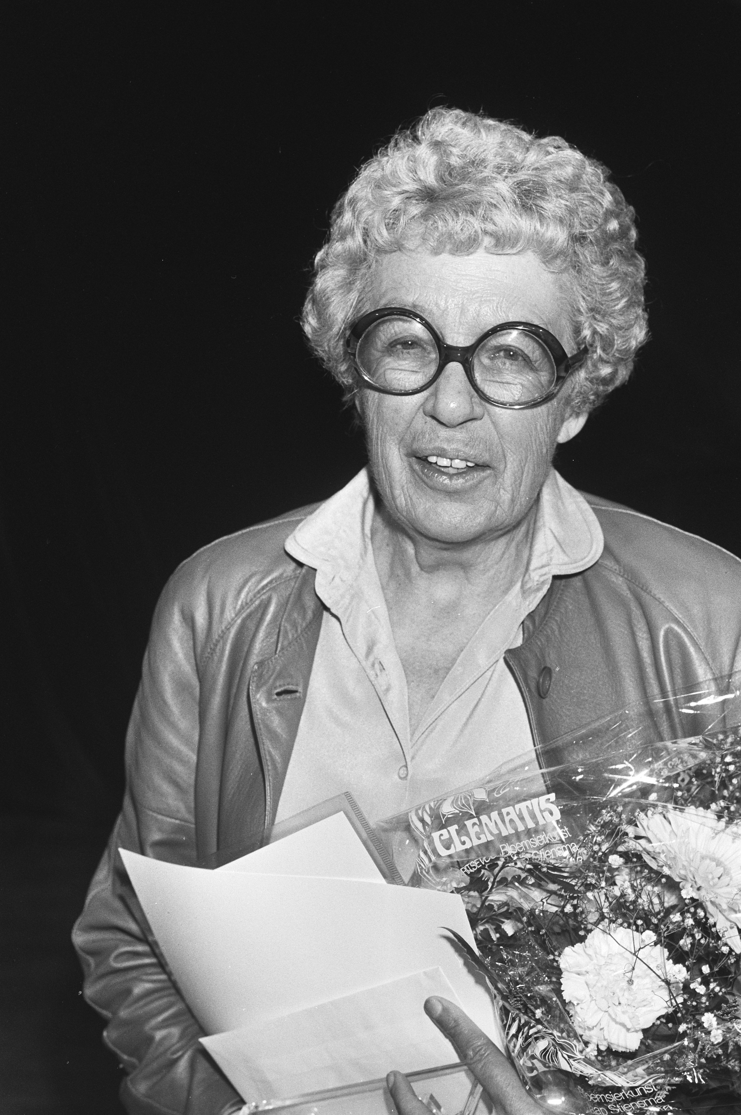 Collectie / Archief : Fotocollectie Anefo Reportage / Serie : Uitreiking van de Gouden Griffel aan Annie M. G. Schmidt en het Gouden Penseel aan Piet Klaasse tijdens de opening van de Kinderboekenweek Beschrijving : Annie M.G. Schmidt Datum : 7 oktober 1981 Locatie : Alkmaar, Noord-Holland Trefwoorden : kinderboekenweek, portretten, schrijvers Persoonsnaam : Schmidt, Annie M.G. Fotograaf : Croes, Rob C. / Anefo Auteursrechthebbende : Nationaal Archief Materiaalsoort : Negatief (zwart/wit) Nummer archiefinventaris : bekijk toegang 2.24.01.05 Bestanddeelnummer : 931-7269